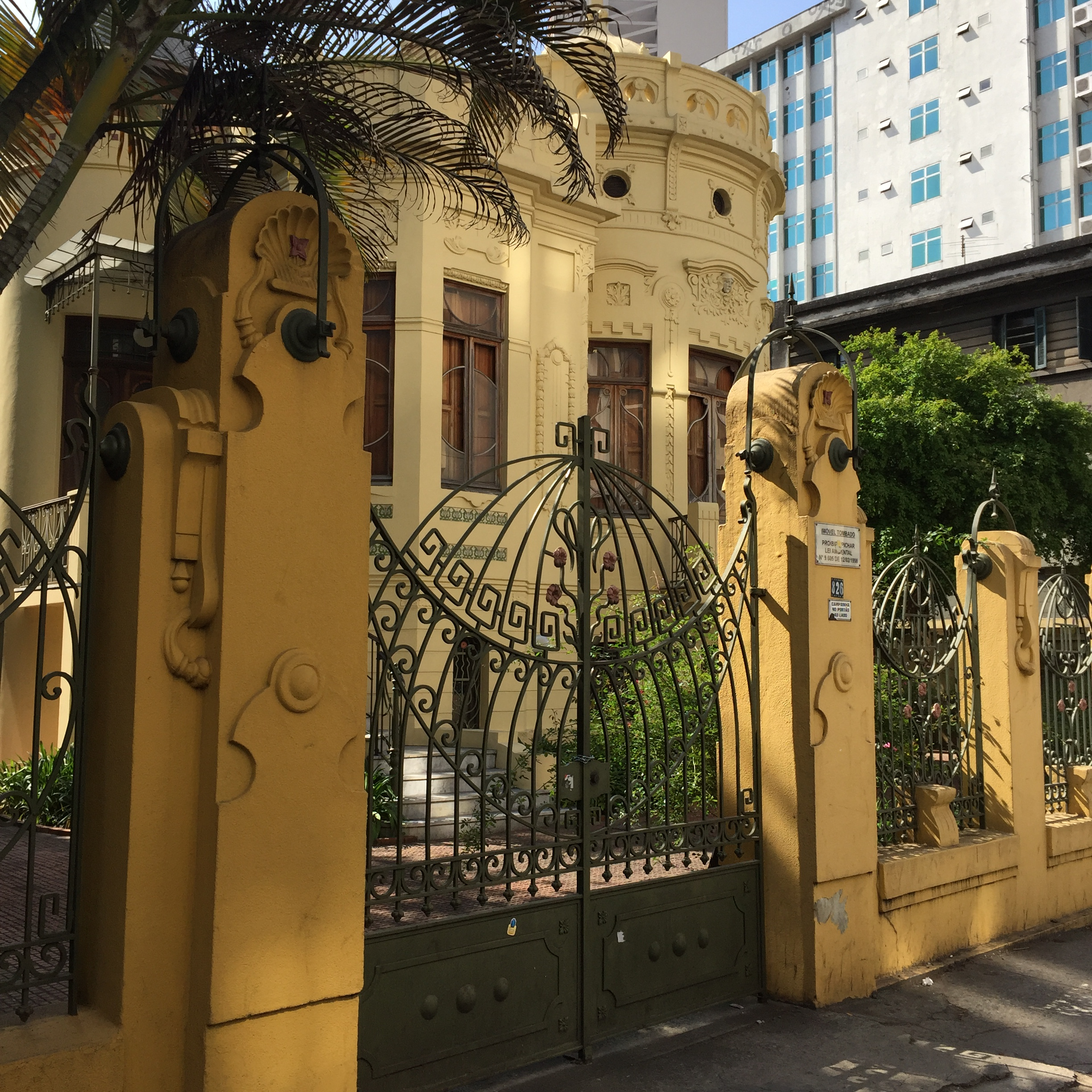 Portão frontal do Castelinho da Brigadeiro, em São Paulo (SP), Brasil